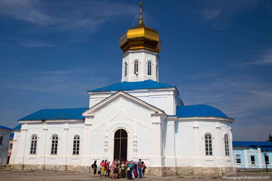 Вознесенская церковь (1852 год постройки). Вознесенский Сызранский мужской монастырь